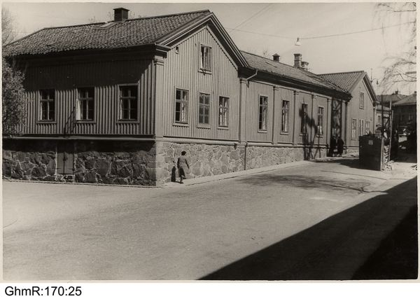 Carlgrenska skolan vid Allmänna vägen 1/Karl Johansgatan 2 i Göteborg år 1938. Byggnaden revs samma år.